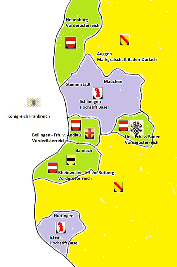 Kartenskizze der Landvogtei Schliengen und Umland (um 1719)